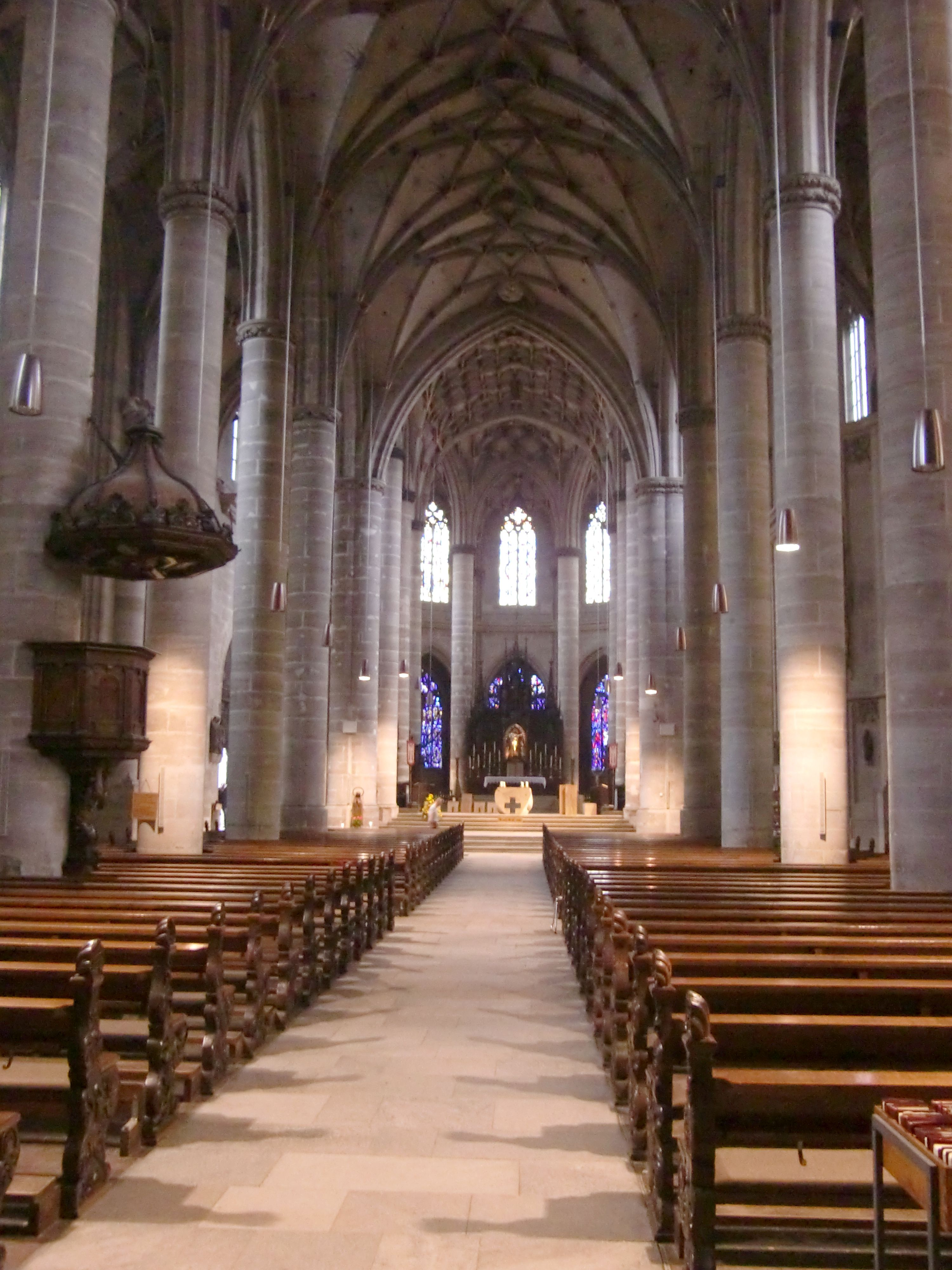 Heilig-Kreuz-Münster Schwäbisch Gmünd